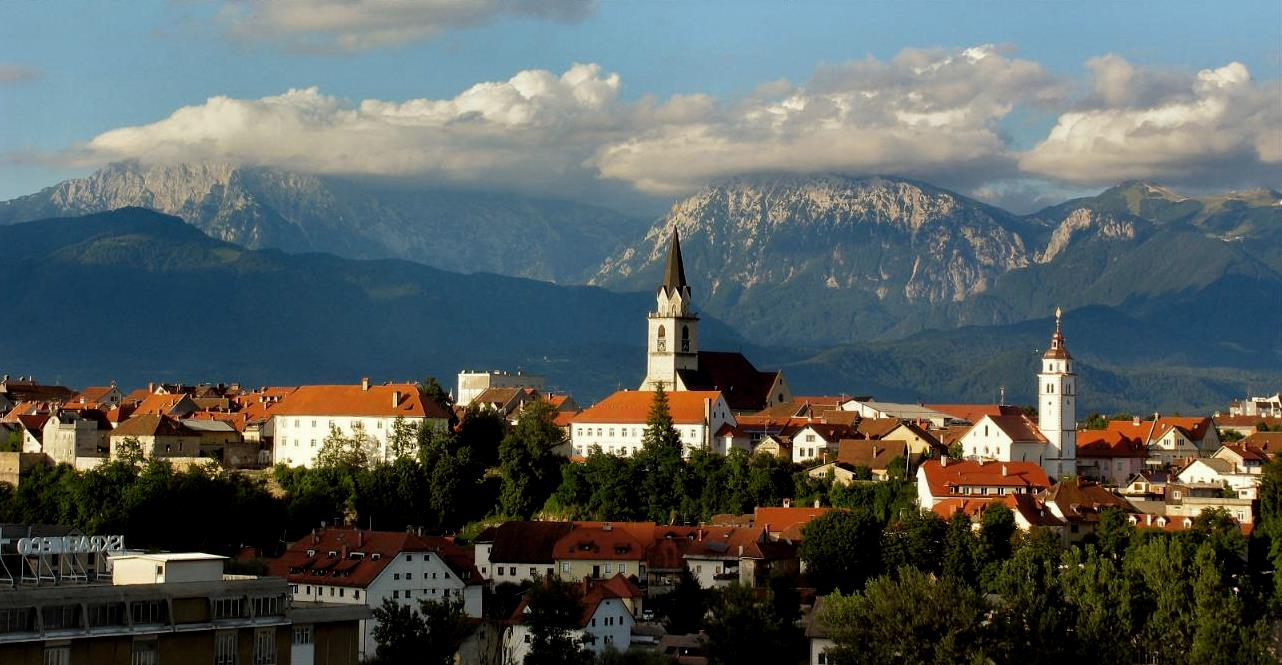 Pogled na mesto Kranj z Labor.